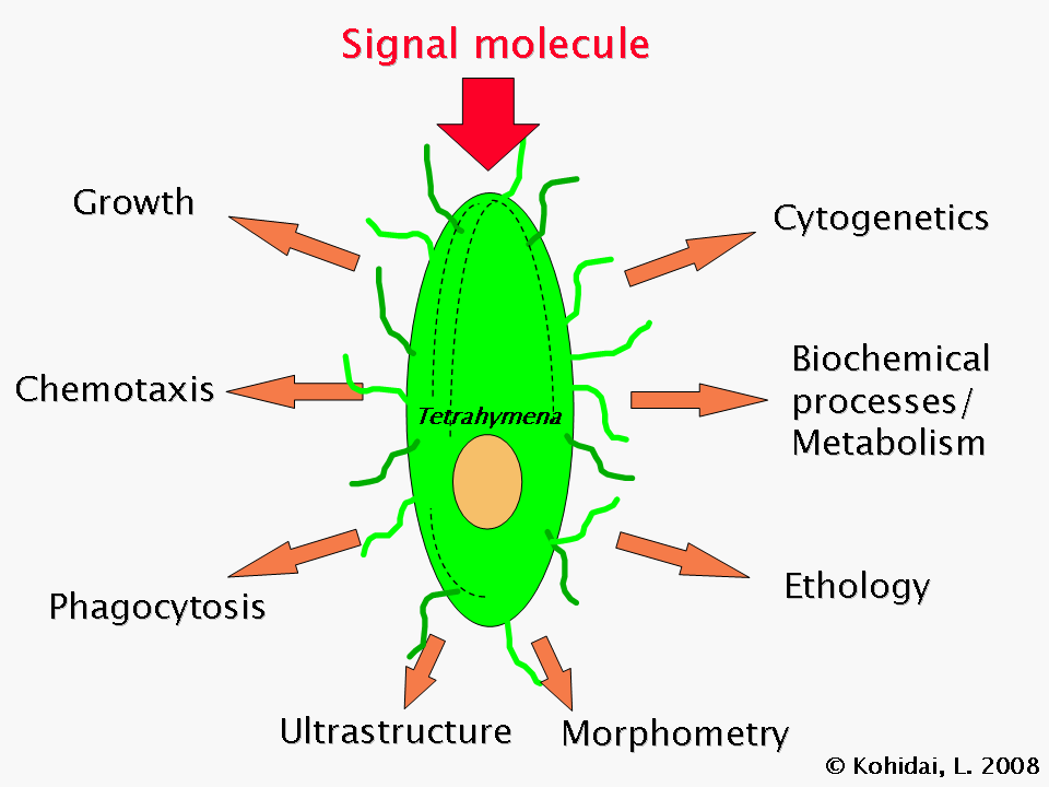 Tetrahymena as a model cell in biomedical research